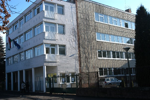 Thúry György Kereskedelmi, Vendéglátó és Idegenforgalmi Szakképző Iskola, Nagykanizsa